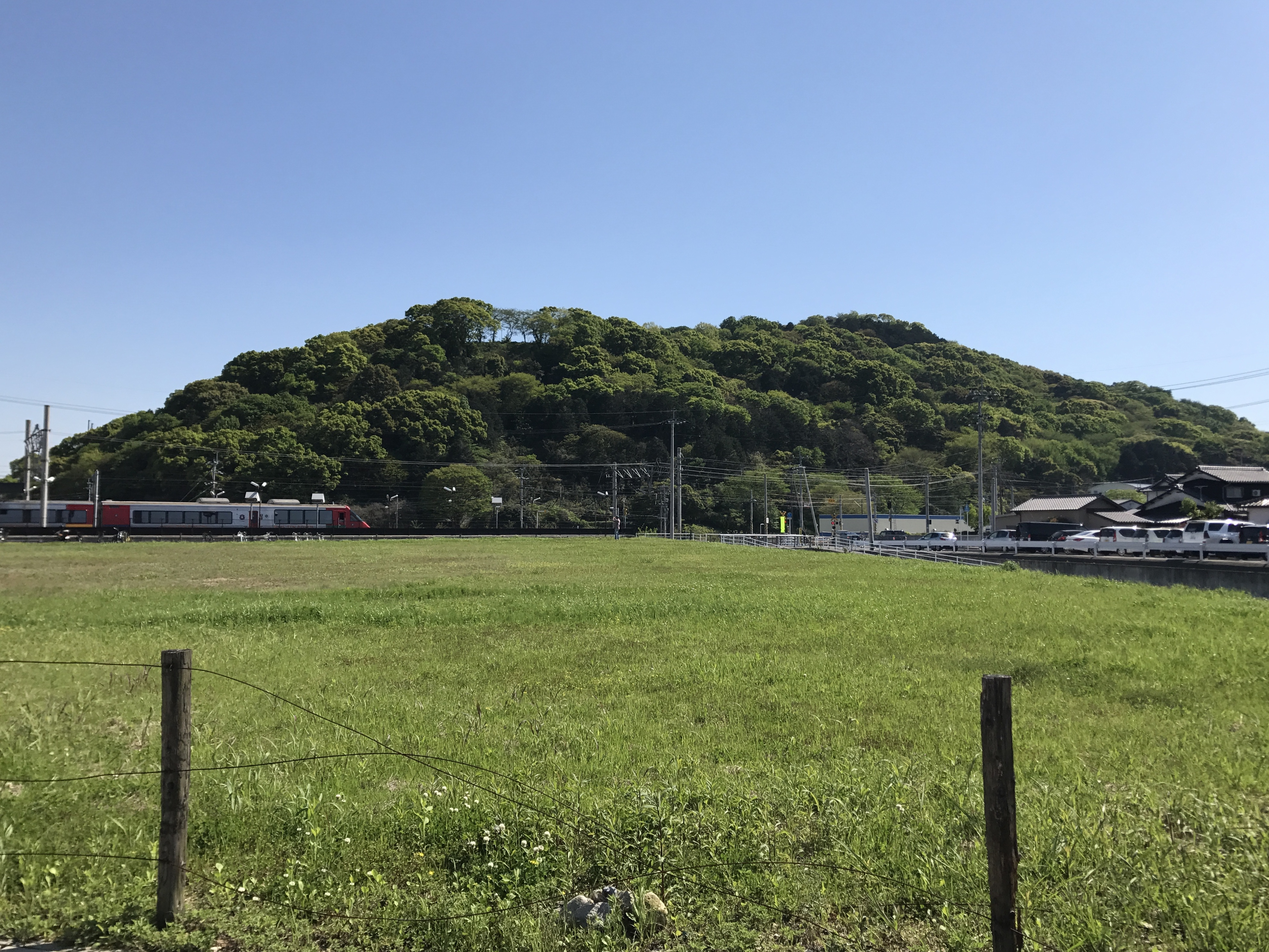 新鳥栖駅前の朝日山公園